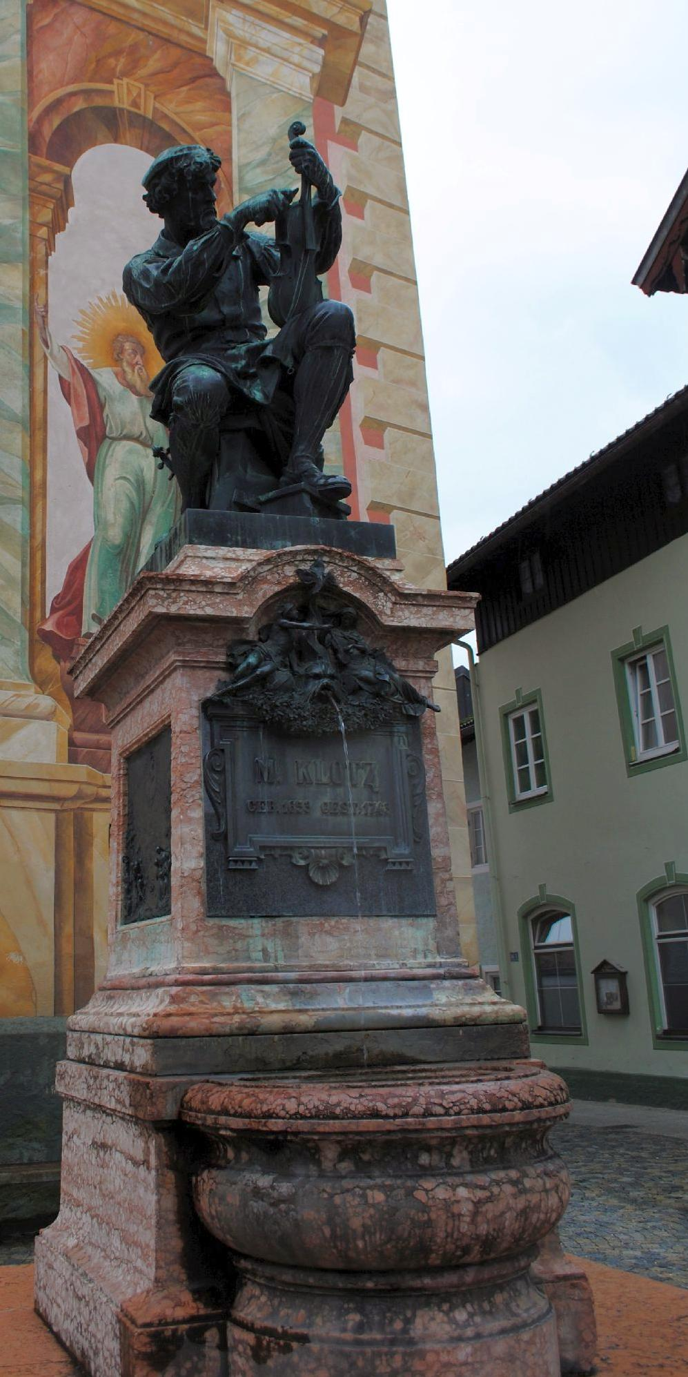 Geigenbaudenkmal